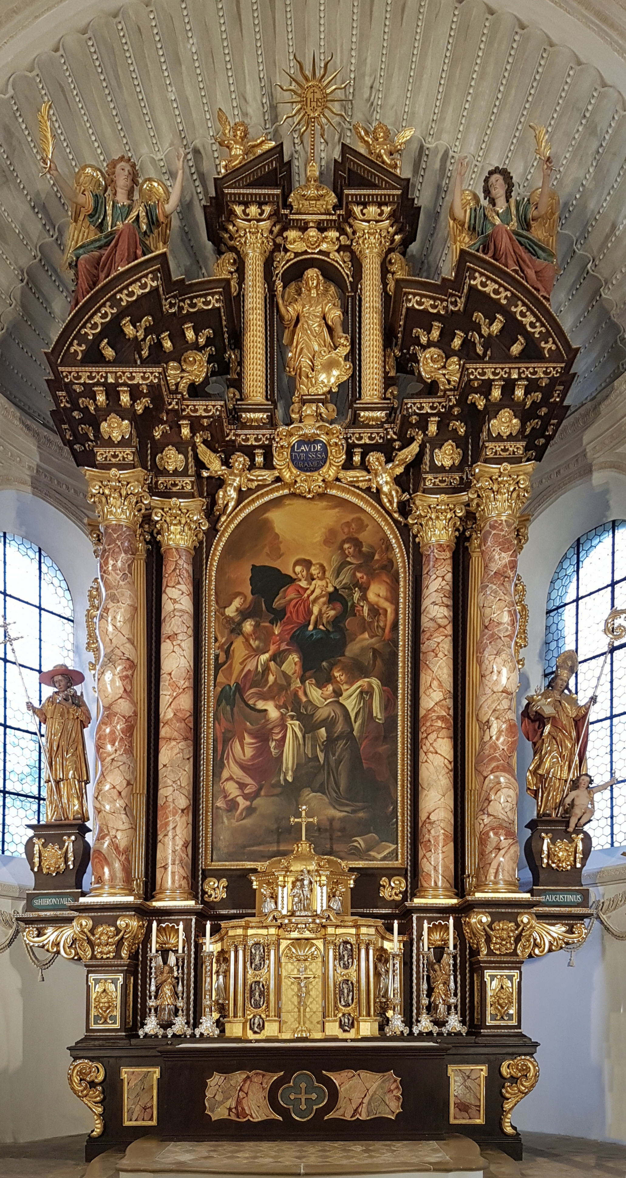 Stiftskirche St. Johannes d. T. (Steingaden)